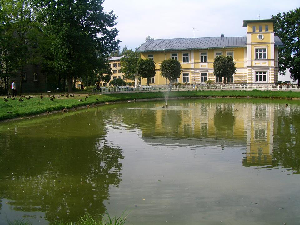 Valga central library